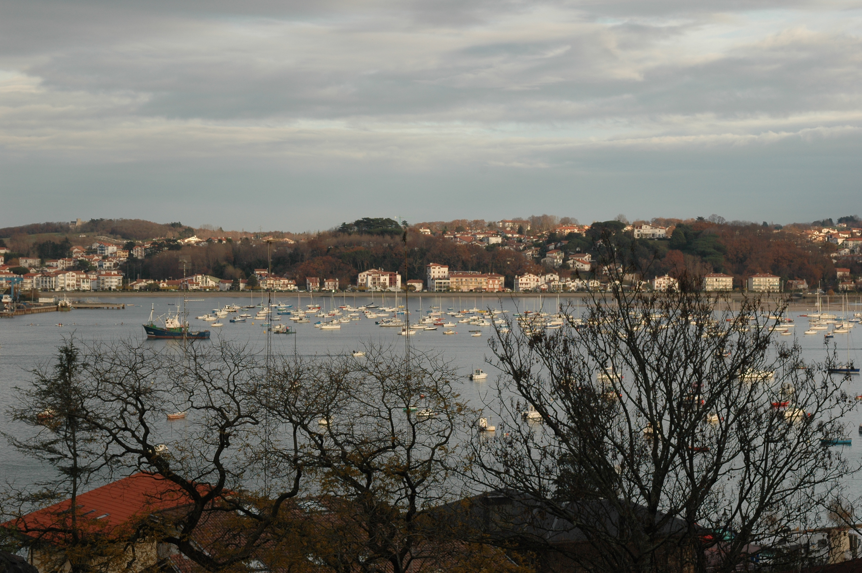 Hendaye, vue de Fontarrabie, par dessus la baie de Txingudi. Photo prise le 06/01/07 par Harrieta171